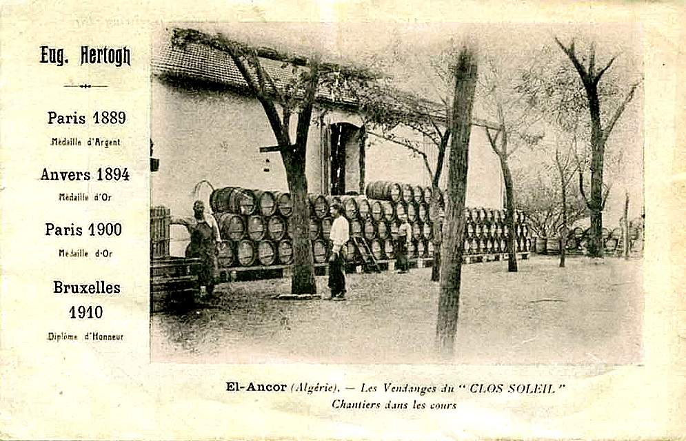 Domaine du Clos du Soleil, à El-Ançor, Oranie, avec les récompenses internationales reçues par ses vins